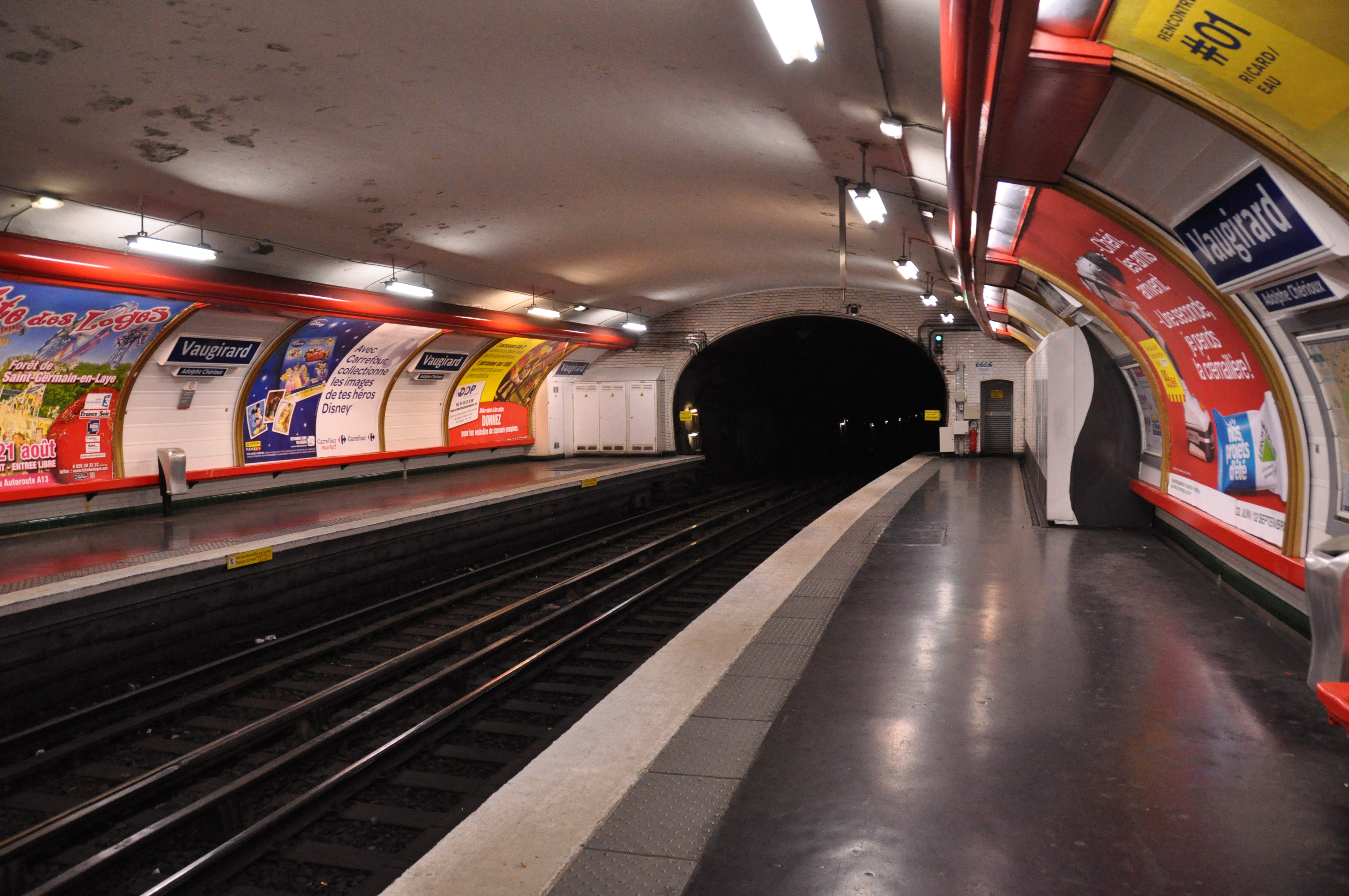 Vue des quais de la station Vaugirard sur la ligne 12 du métro de Paris.